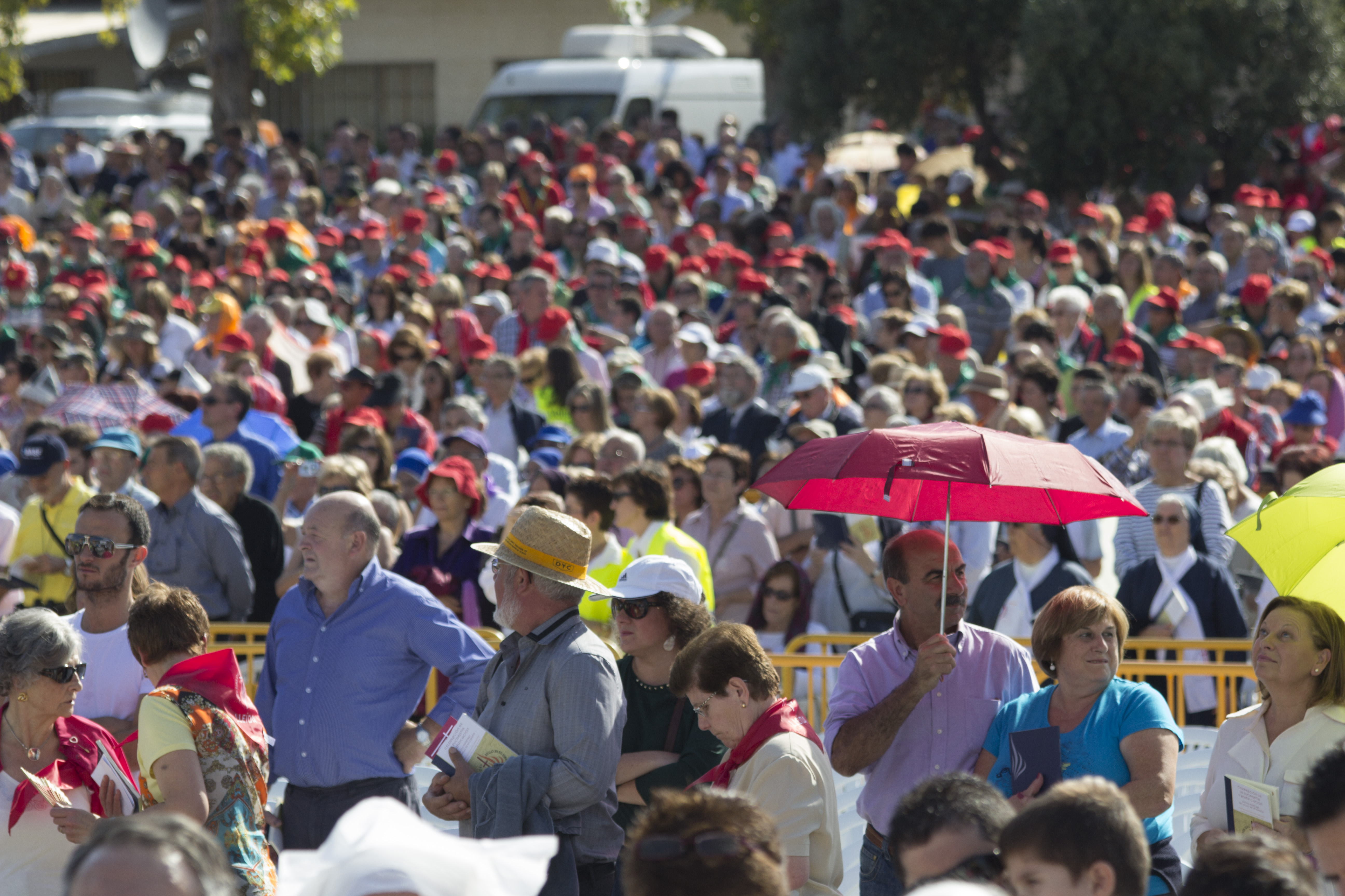 Desenes de milers de persones van assistir a l'acte de Beatificació de 522 màrtirs que es va celebrar a Tarragona el 13 d'octubre de 2013.